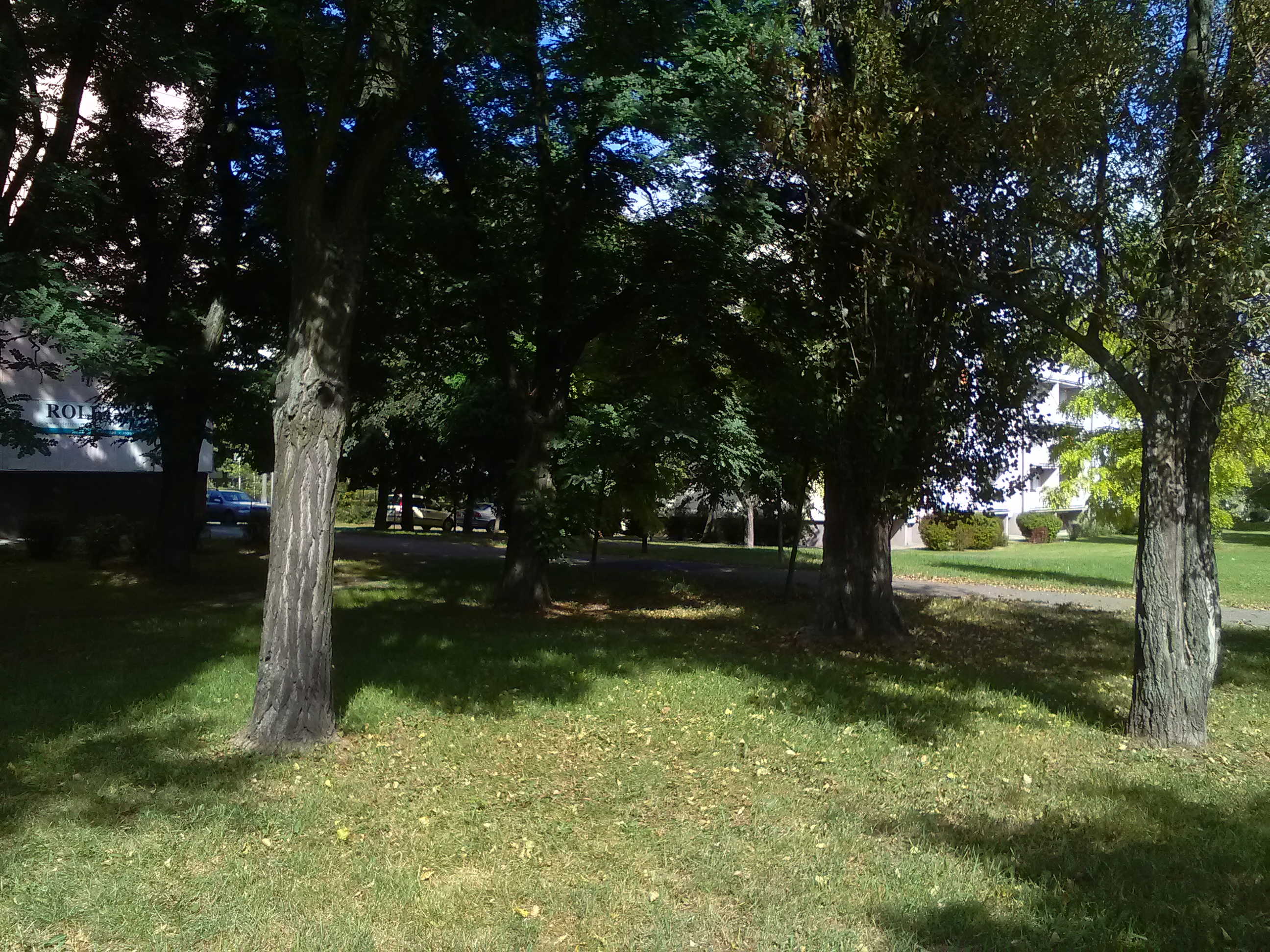 Park Rataje w Poznaniu. Na osiedlu Rzeczpospolitej.